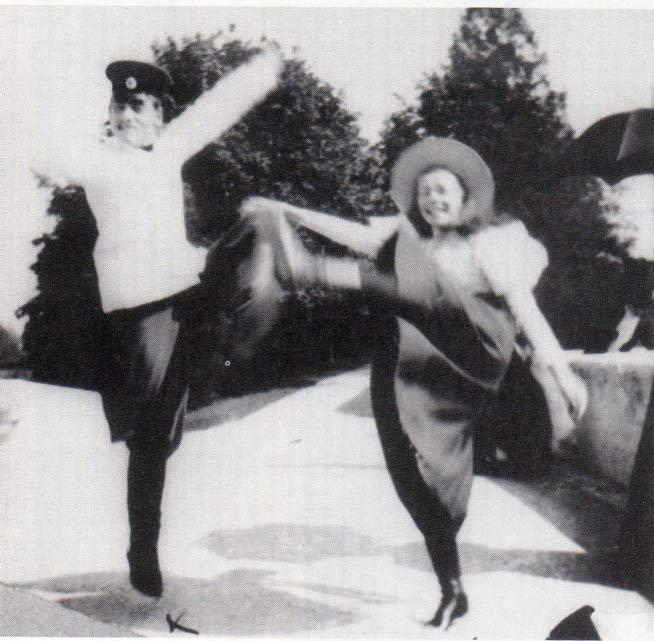 Grão-Duque Miguel Alexandrovich com a irma, a Grã-Duquesa Olga Alexandrovna